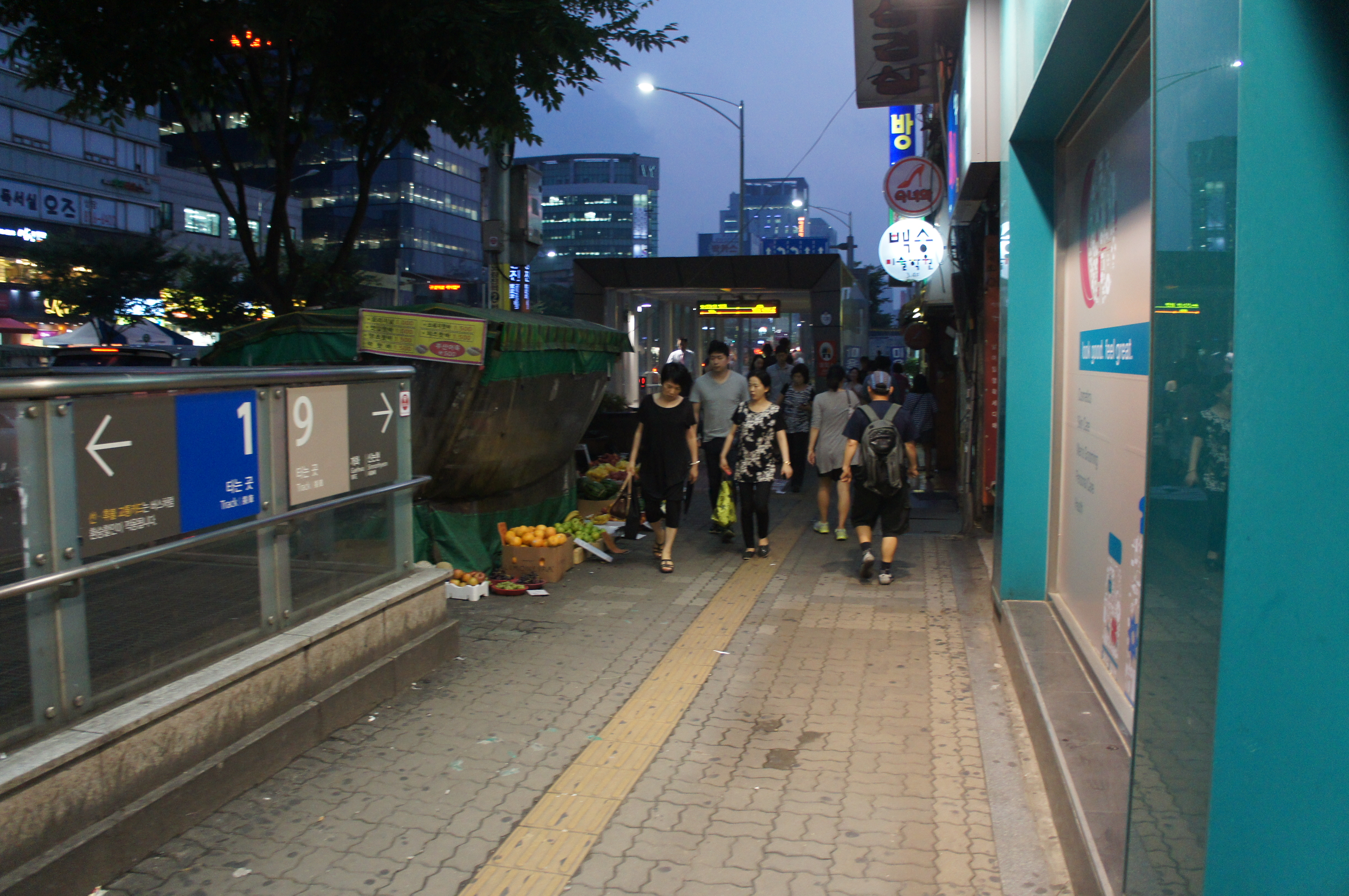 노량진역 1호선-9호선 외부환승통로로 사용되고 있는 노량진역 1번 출구